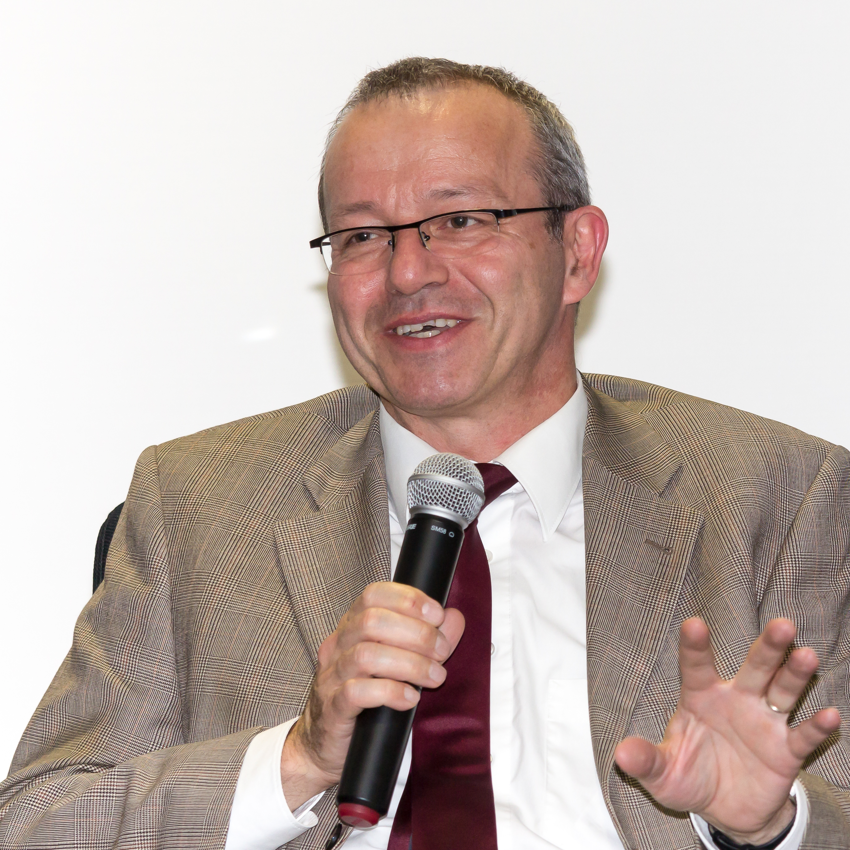 Zwei Jahre nach der ersten „Nutzerkonferenz“ unter dem Motto „Was wünschen sich die Benutzer vom zukünftigen Archiv?“ am 26. Juni 2012 lud der Förderverein „Freunde des Historischen Archivs der Stadt Köln e.V.“ zur zweiten Nutzerkonferenz ein. Unter dem Motto „Was Köln schon wieder kann“ tauschten sich am 21. Oktober 2014 im Lesesaal des Historischen Archivs der Stadt Köln Vertreter der verschiedenen Nutzergruppen aus. Foto: Prof. Dr. Ralph Jessen, Professur für Neuere Geschichte am Historischen Institut der Universität zu Köln